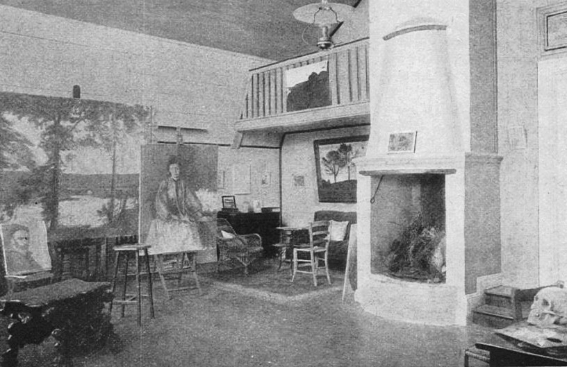 Villa Richard Bergh interiör 1906